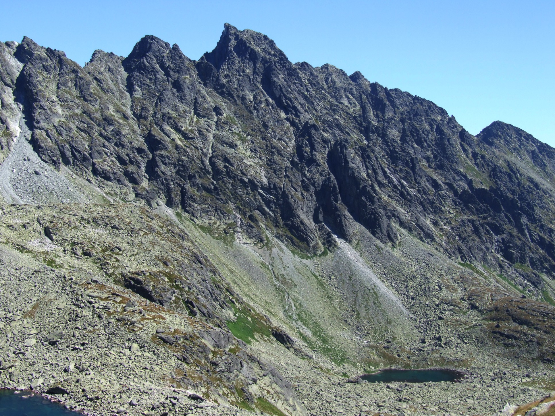 Grań Baszt i Wyżni Kozi Staw